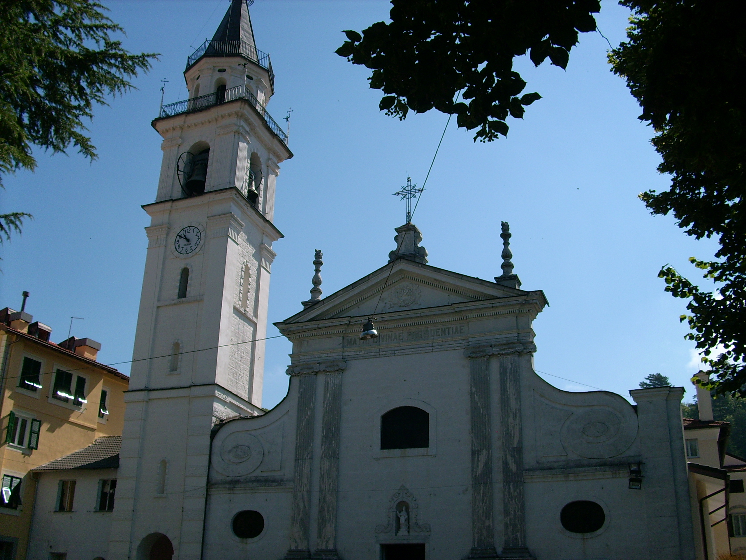 Chiesa di sant'Onorato di Arles presso Torriglia, Liguria, Italia